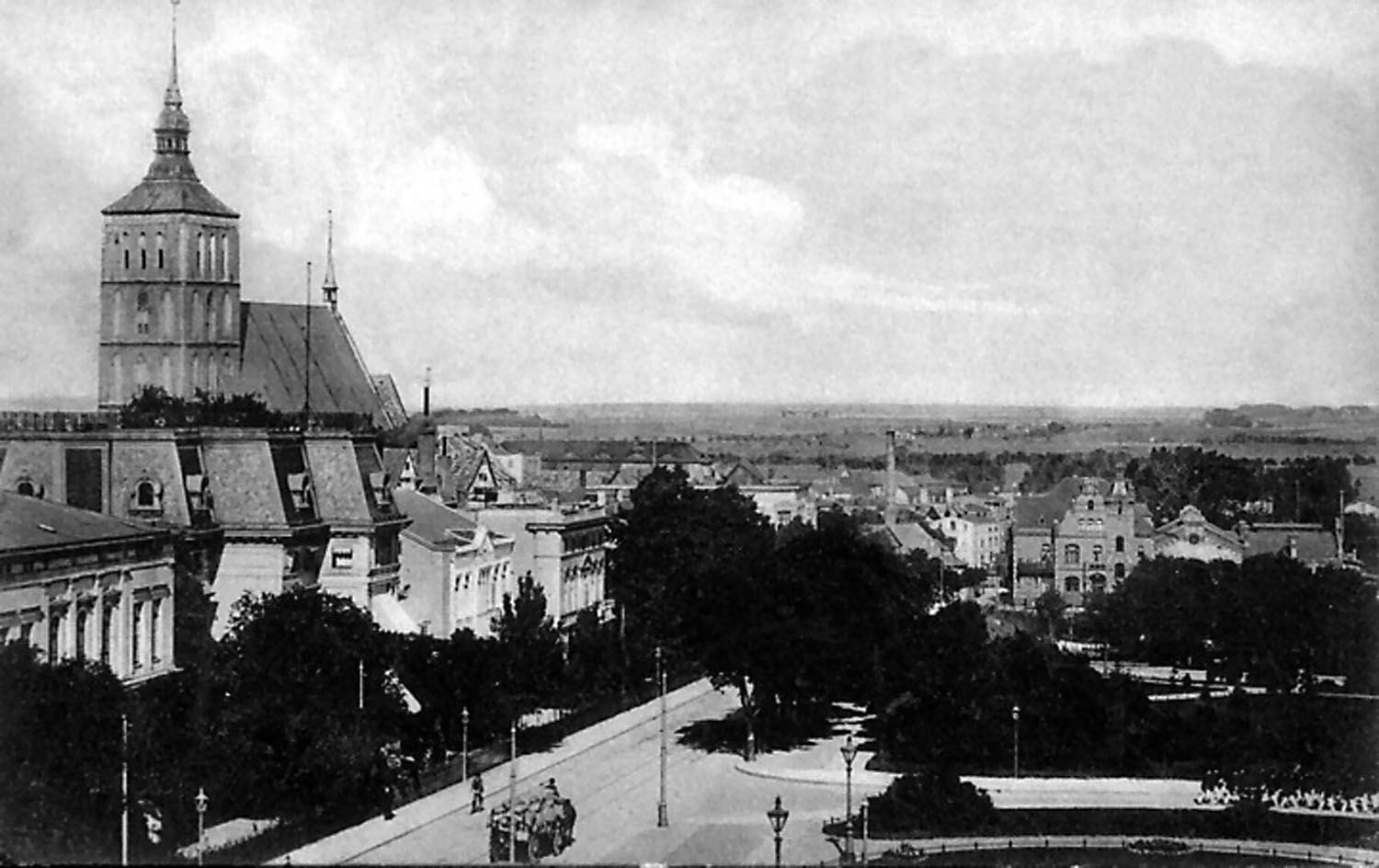 Rostock Wallstrasse (heute Ernst-Barlach-Straße), Nikolaikirche